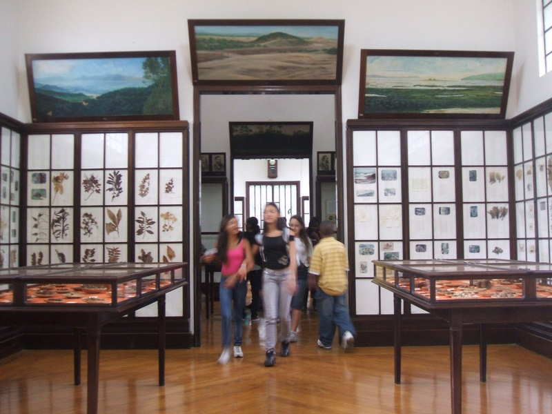 Museu Botânico Dr. João Barbosa Rodrigues, interior. Jardim Botânico, São Paulo, Brasil.